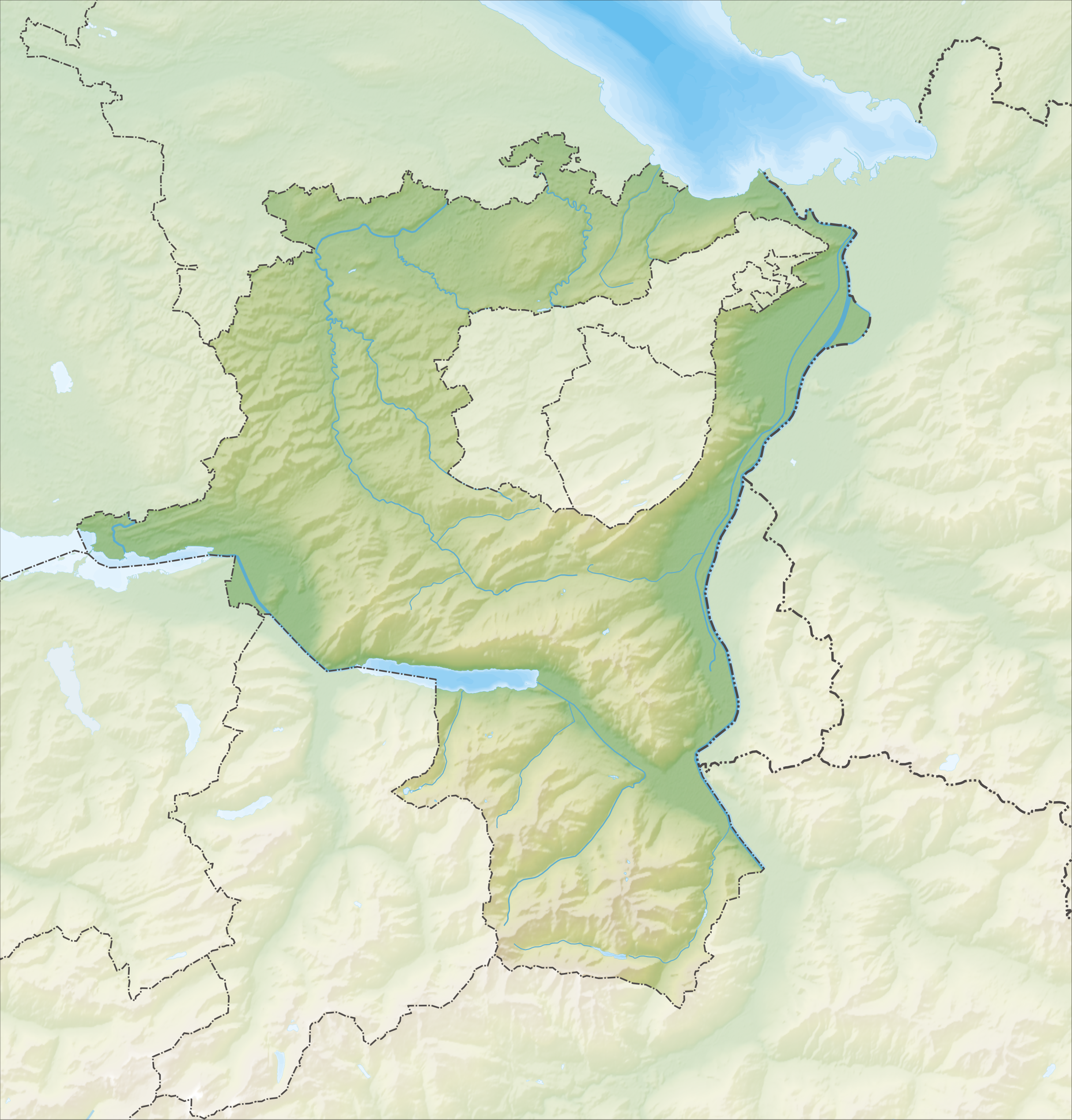 Reliefkarte des Kantons St. Gallen Topographischer Hintergrund: NASA Shuttle Radar Topography Mission (public domain). SRTM3 v.2.